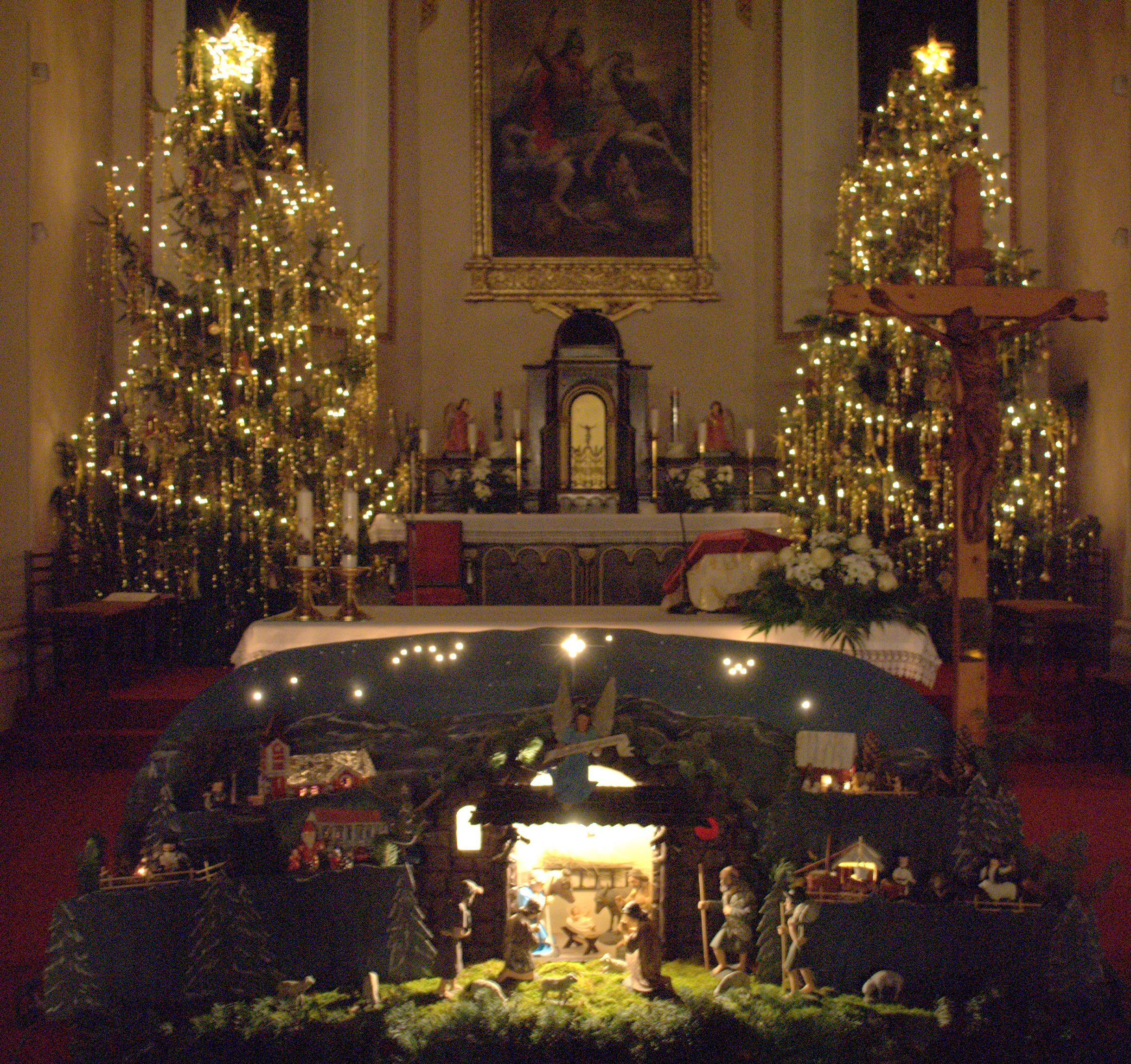 Palásti Betlehem 2014